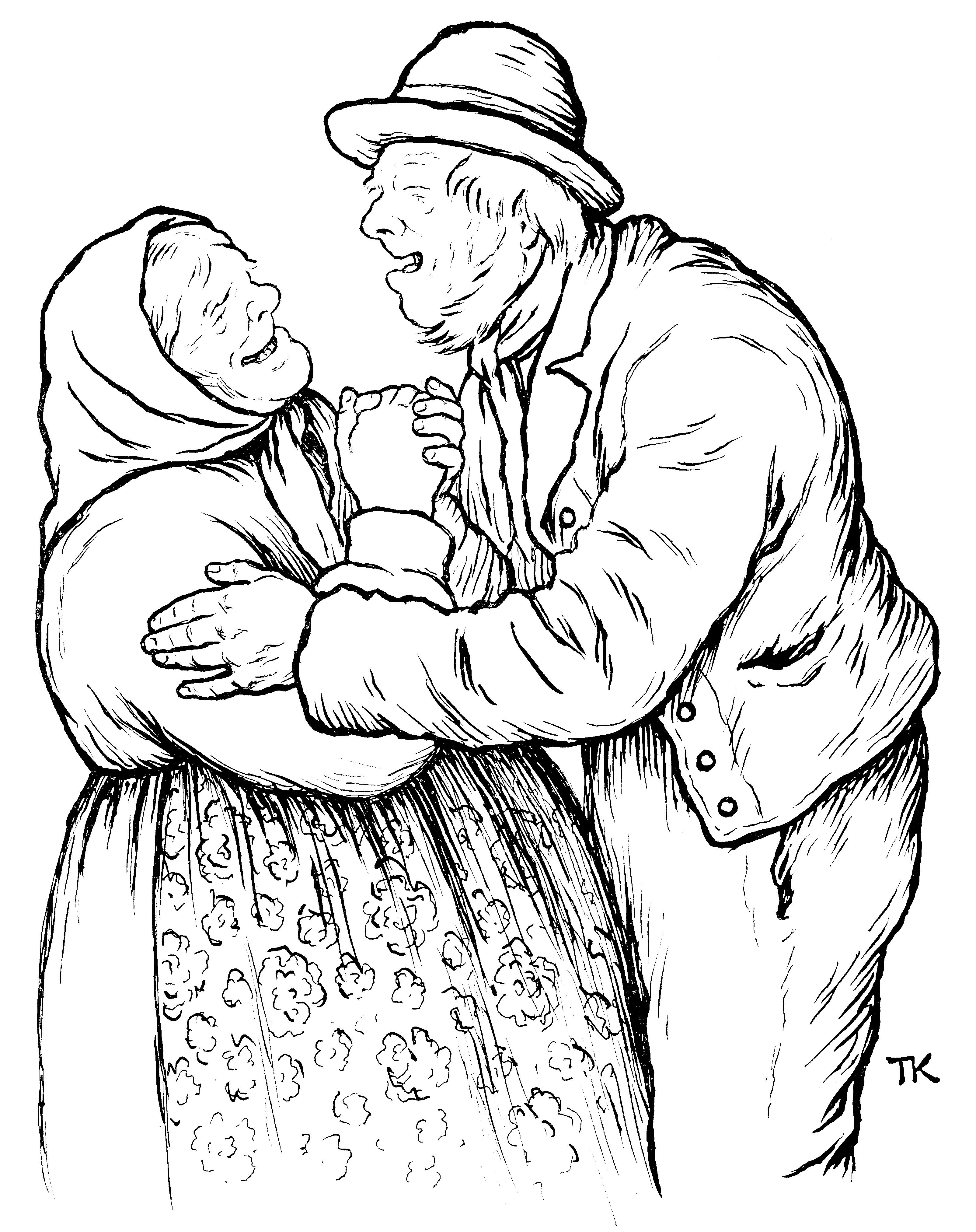 Illustrasjon til folkeeventyret Gudbrand i Lia «Takk skal du ha for det,» sa konen, «og mange takk også» Scanned illustration from 1936 edition of Asbjørnsen & Moe: Samlede eventyr. Norske kunstneres billedutgave. Gyldendal Norsk forlag.